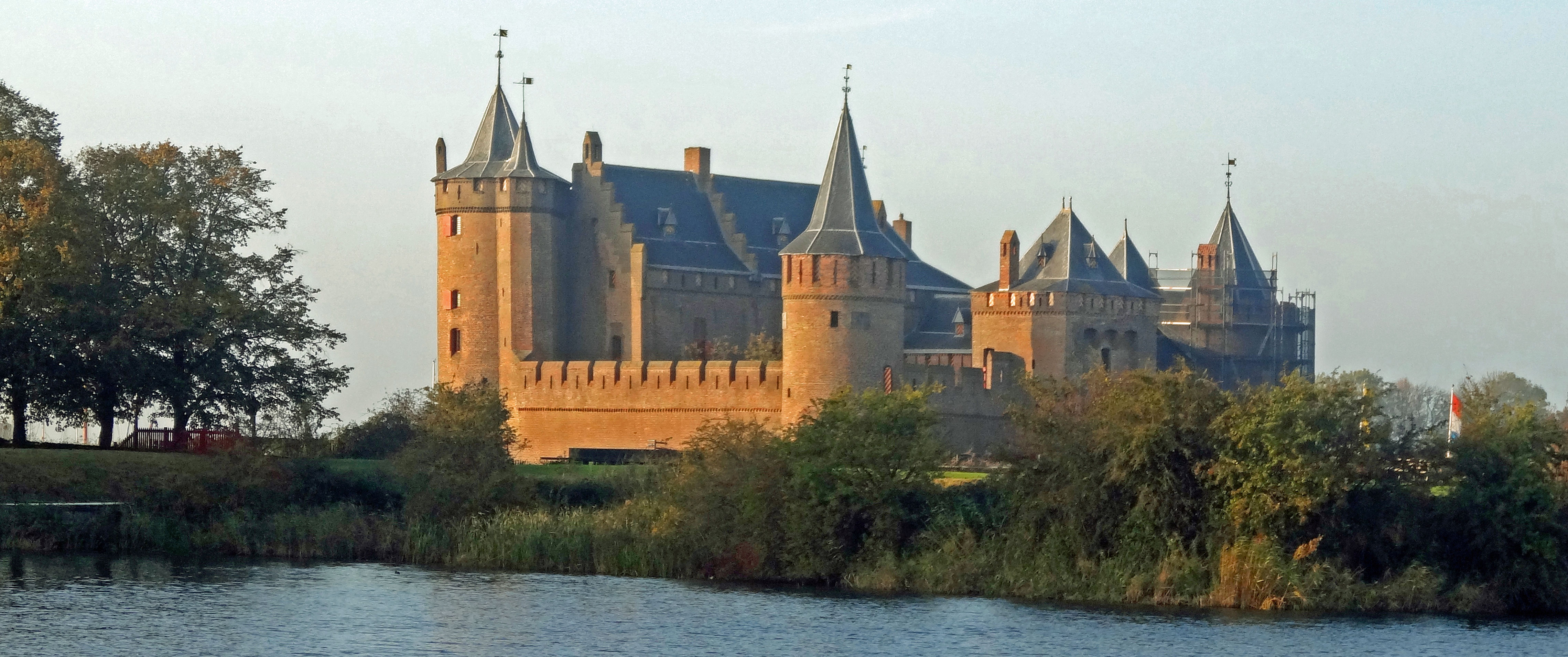 Muiderslot vanuit het zuidoosten gezien